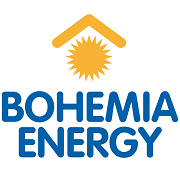 Logo Bohemia Energy